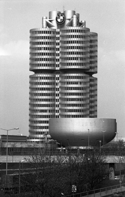 SPD-Parteitag in der Olympiahalle in München. 19.-23.04.82